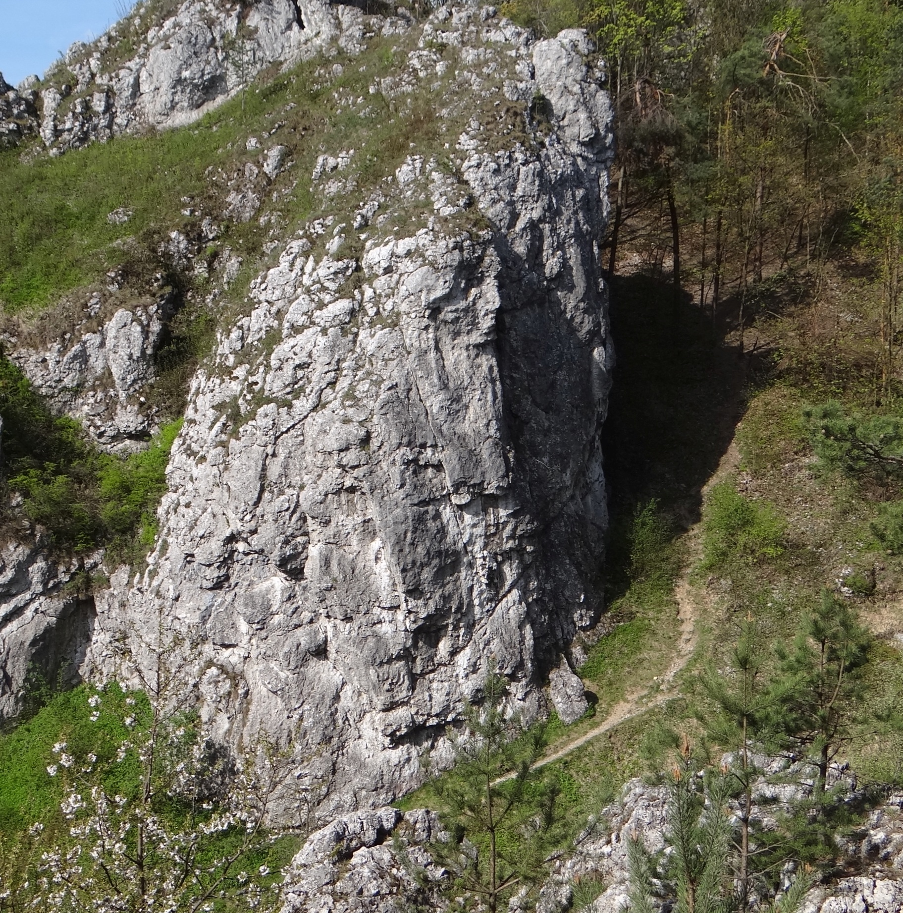 Zamarła Turnia w Dolinie Bolechowickiej